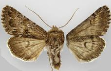 Lasionycta benjamini benjamini male